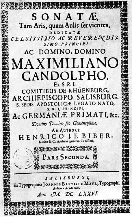 Heinrich Biber : page des titres des Sonatae tam aris quam aulis servientes